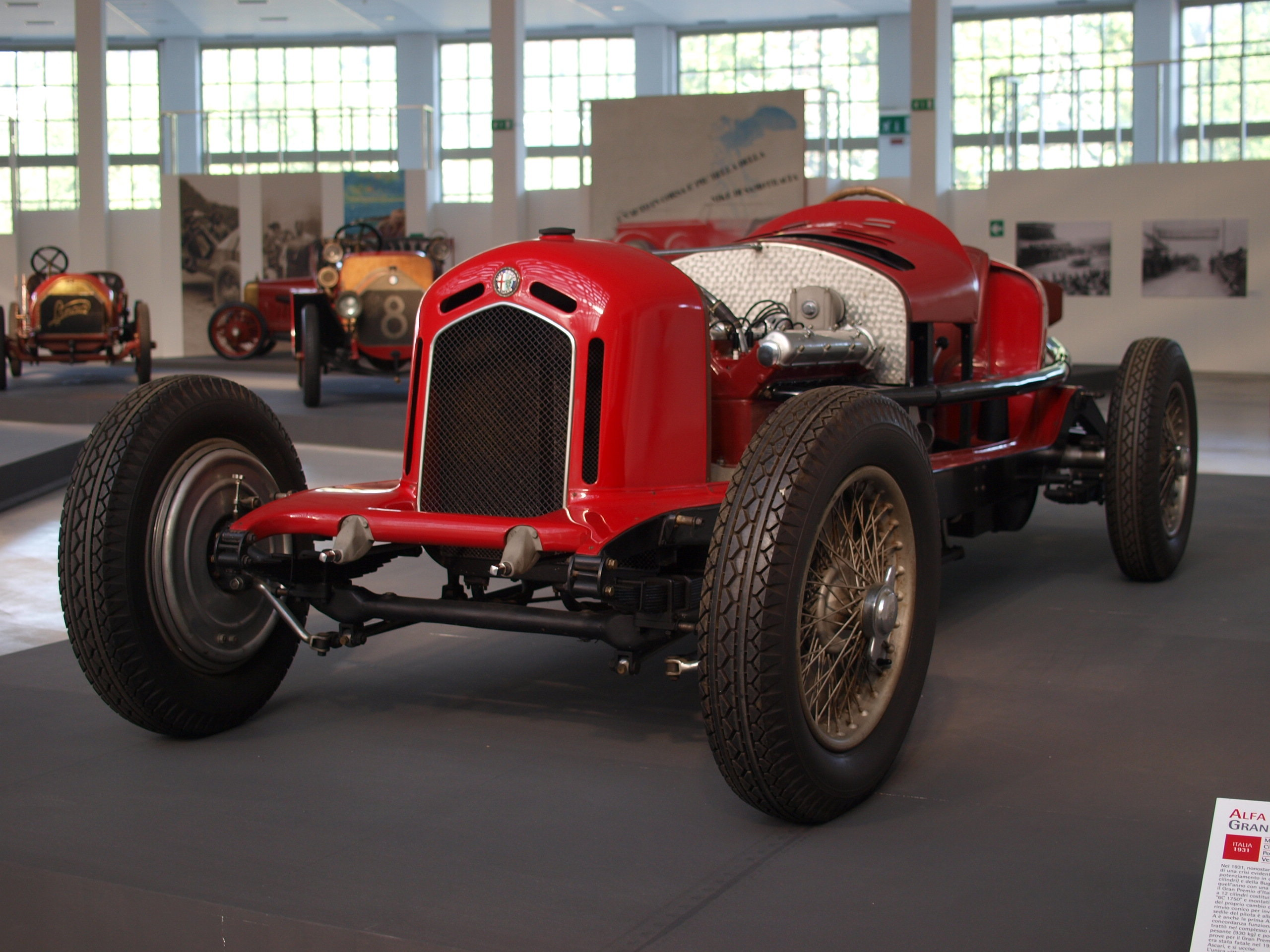 L'evoluzione dell'automobile